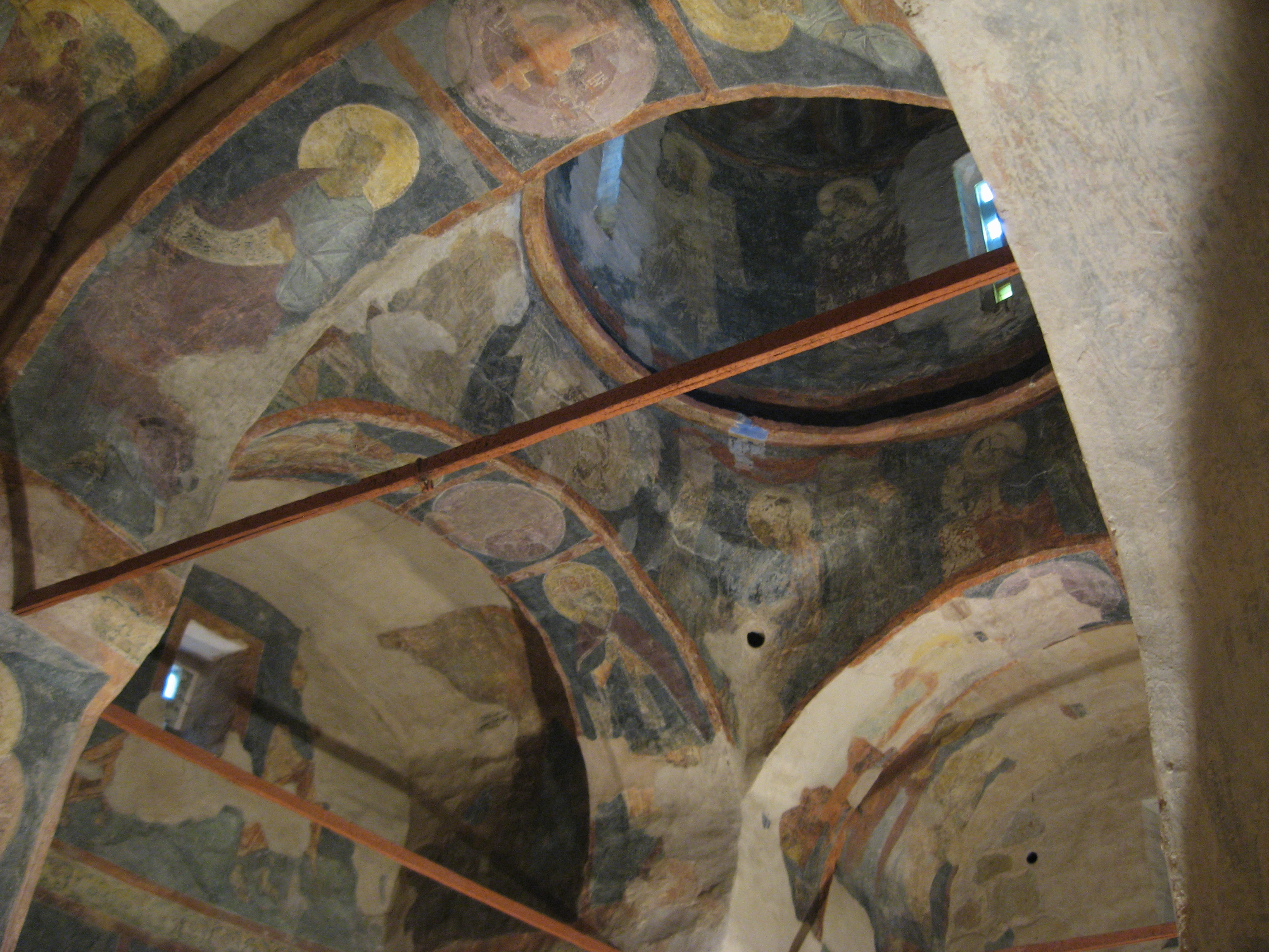 Интерьер с фресками церкви Рождества Христова в Великом Новгороде.